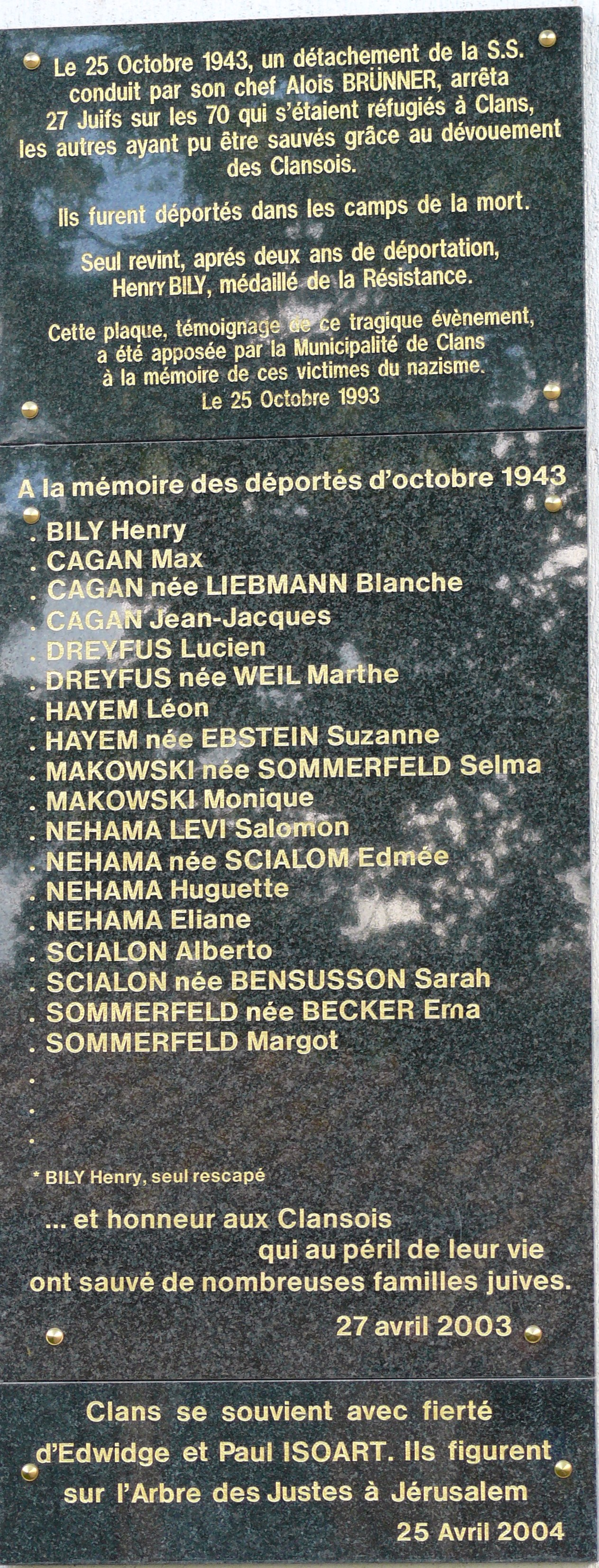 Clans - Plaque commémorative de la déportation des juifs (octobre 1943)